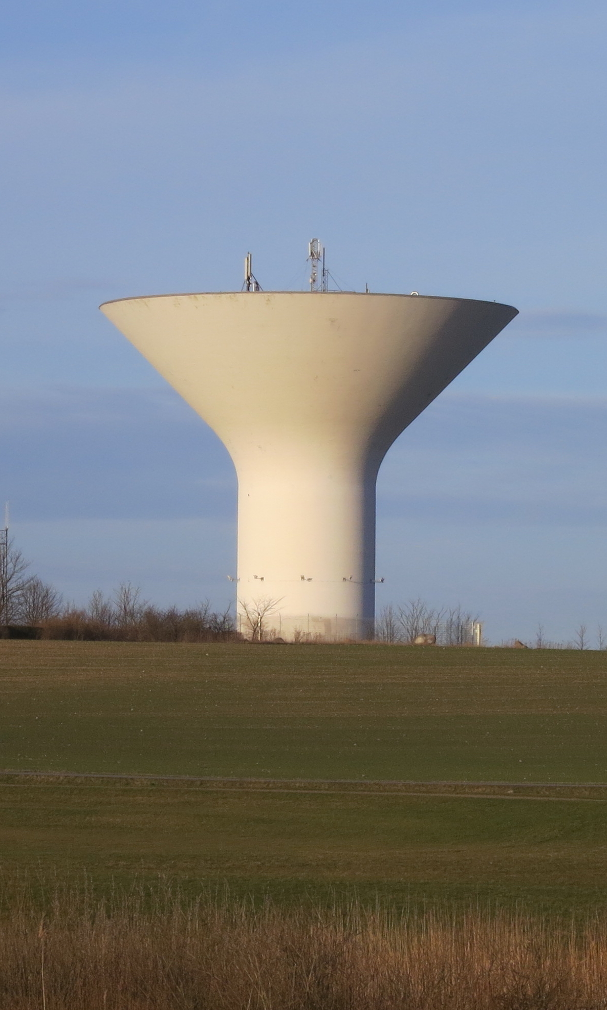 Oxie vattentorn 2014